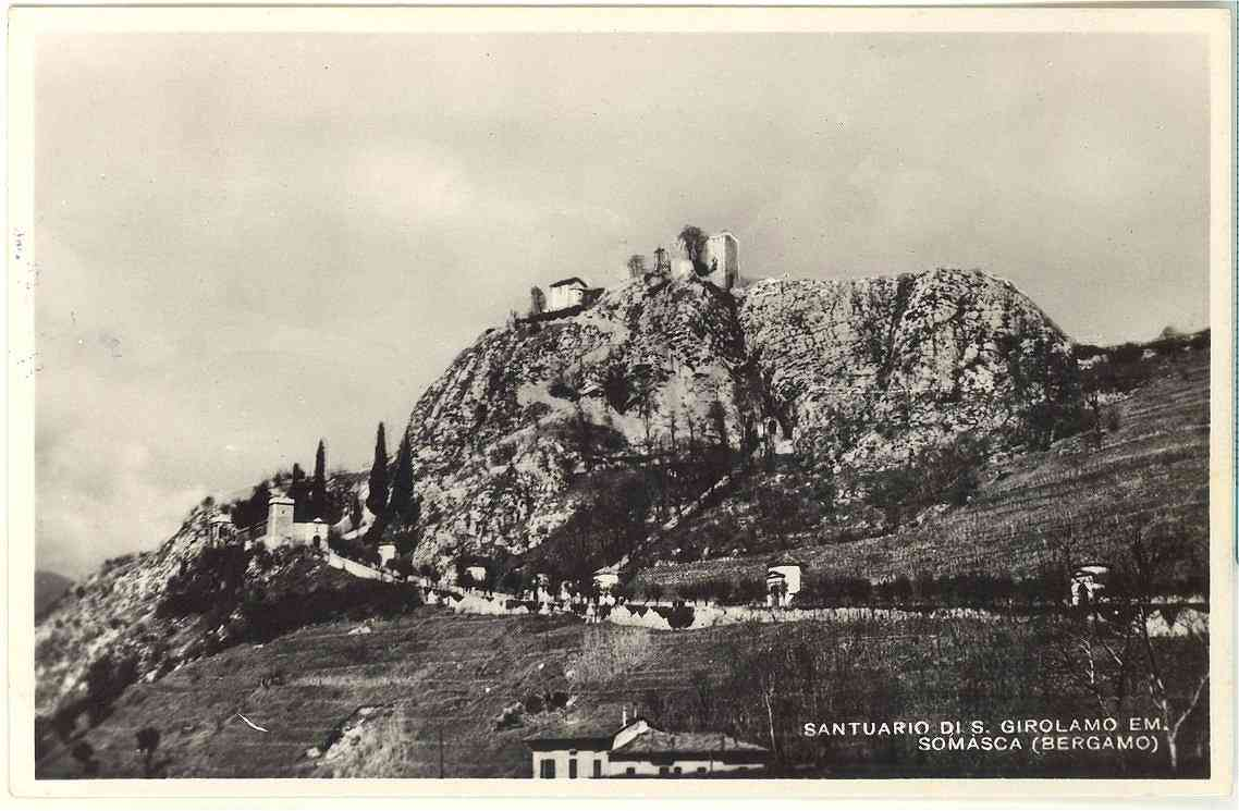 BG Somasca Santuario di San Girolamo Emiliani